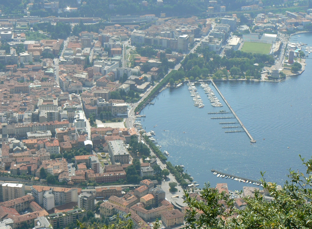 Como